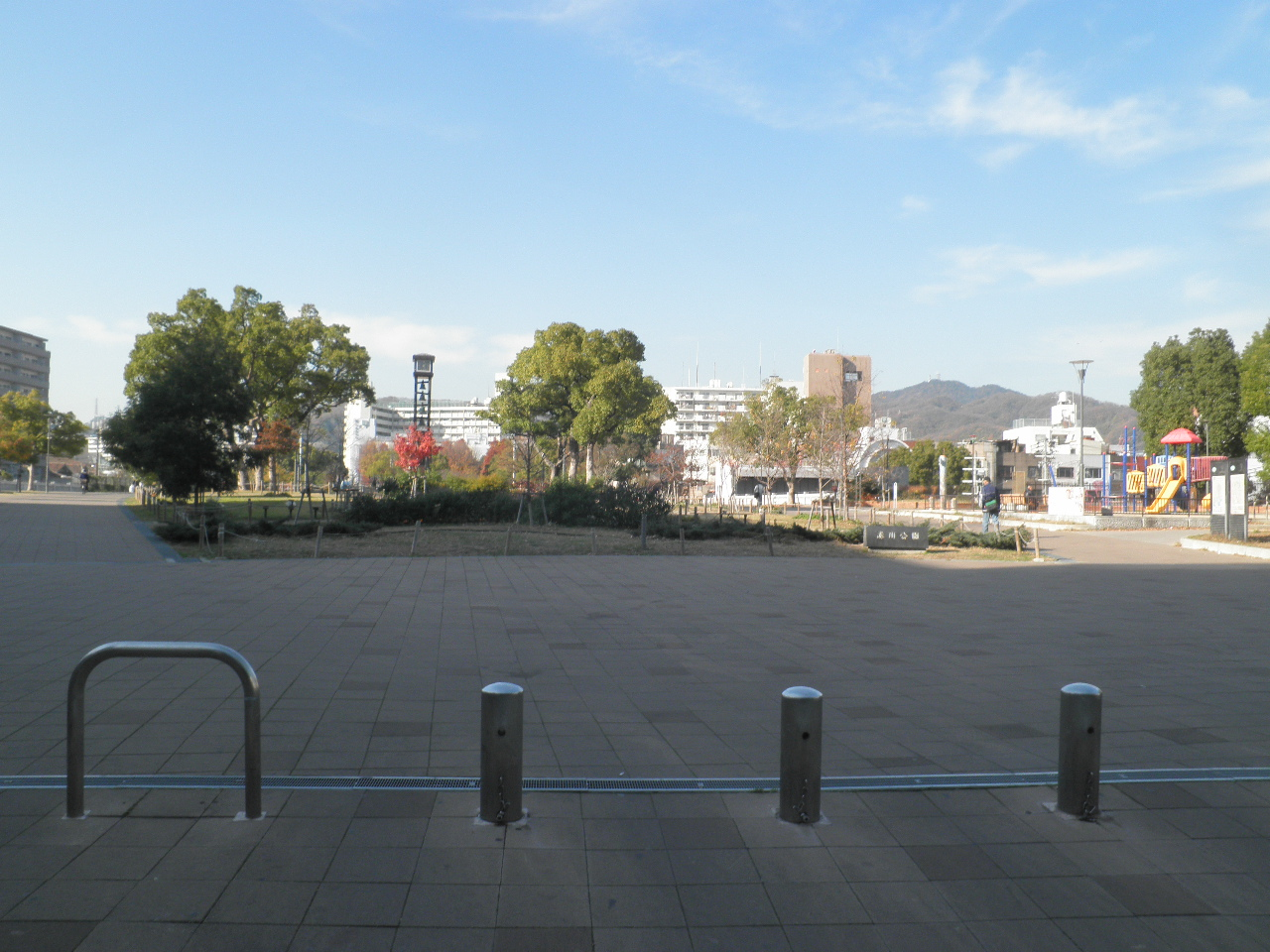 みなとがわこうえん